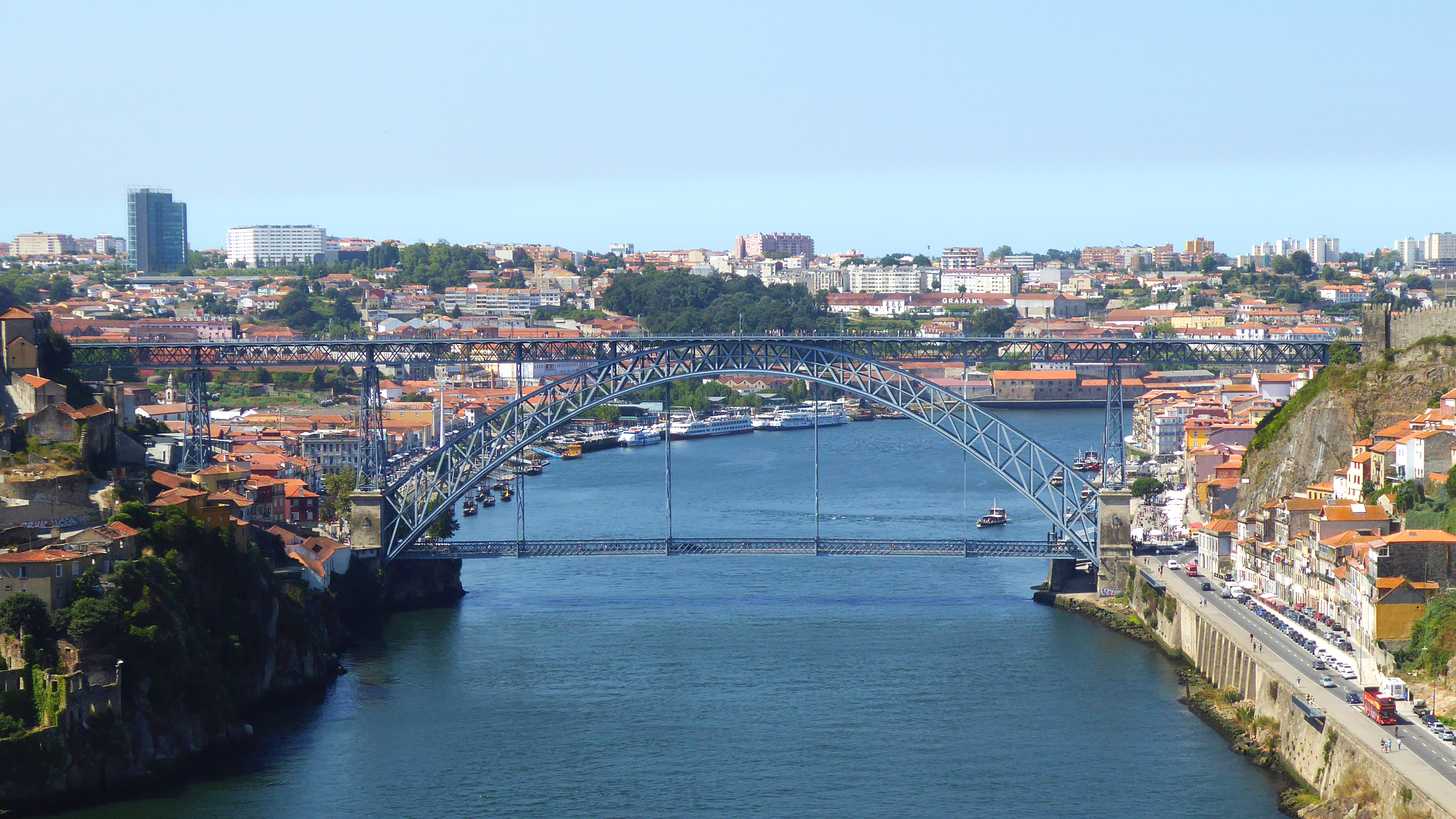 Ponte Luis I oder D. Luis I oder Dom Luis I (erbaut 1886) 385m lange und 60m hohe Stahlfachwerk-Bogenbrücke zwischen Vila Nova de Gaia und der Altstadt von Porto über den Fluss Douro in Portugal - Foto Wolfgang Pehlemann P160556